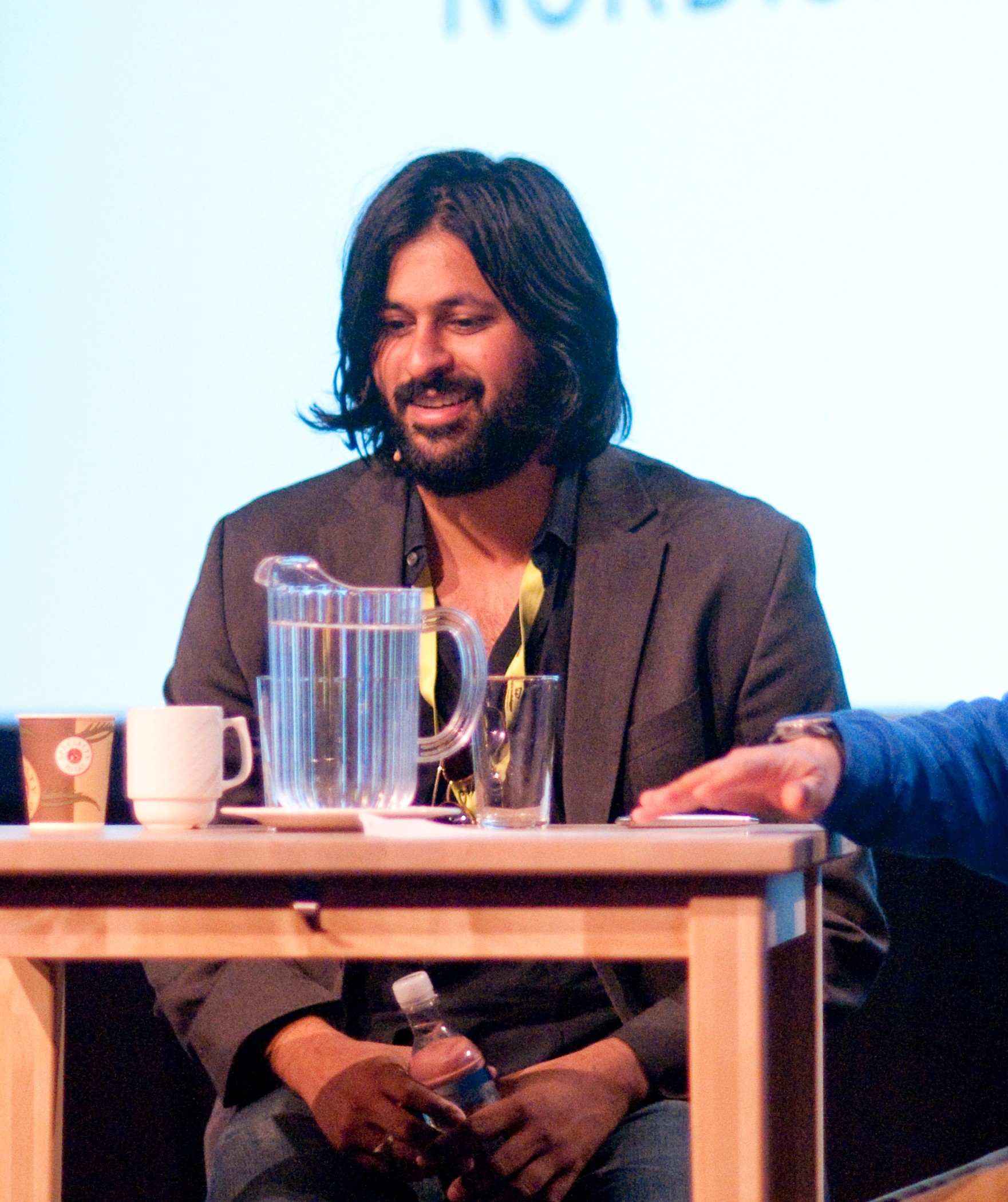 Foto: Chris Ronald Hermansen/Nordiske Mediedager